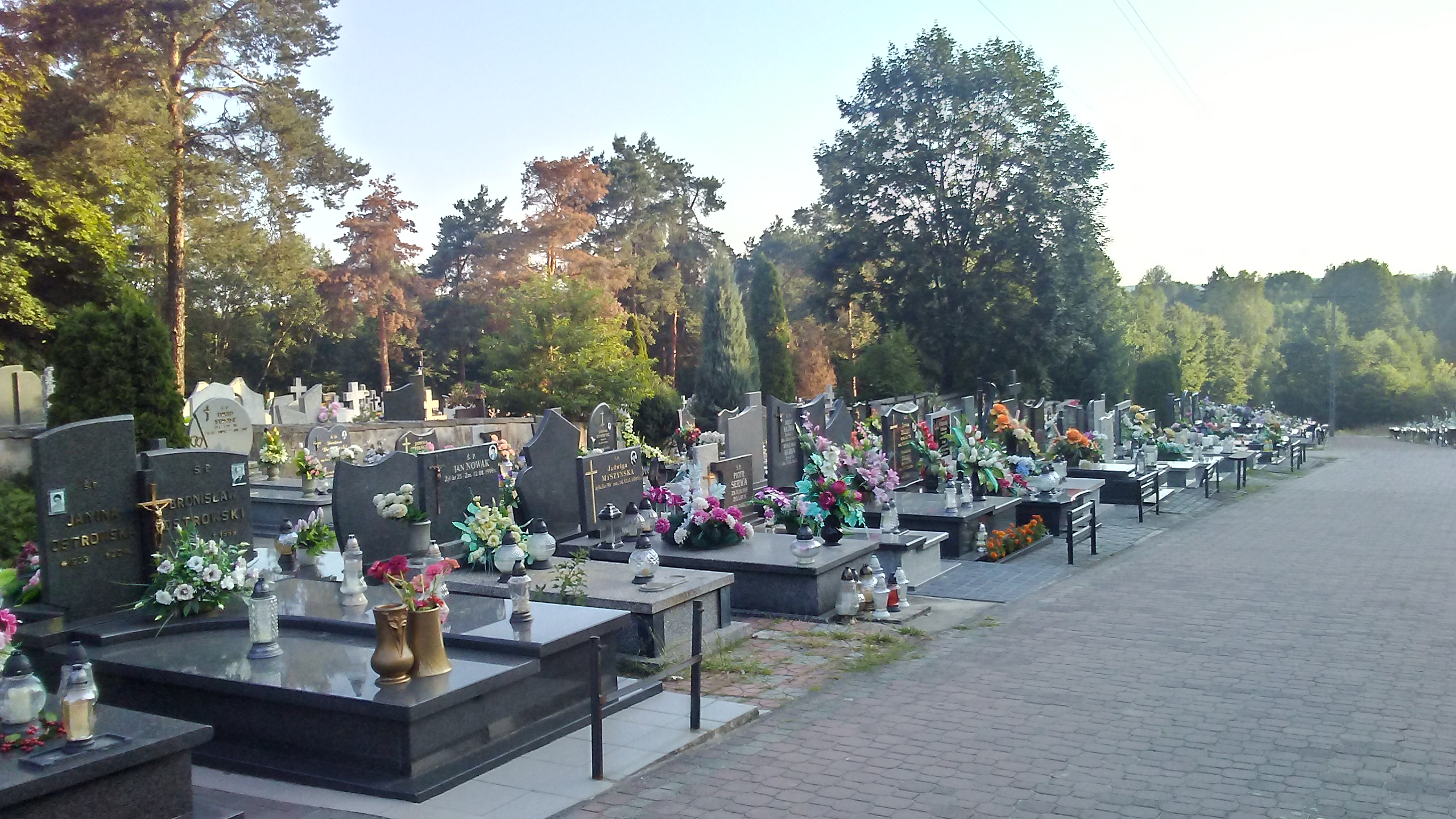 Cmentarz rzymsko-katolicki w Bialobrzegach (dzielnica Tomaszowa Mazowieckiego), PL, EU, CC0